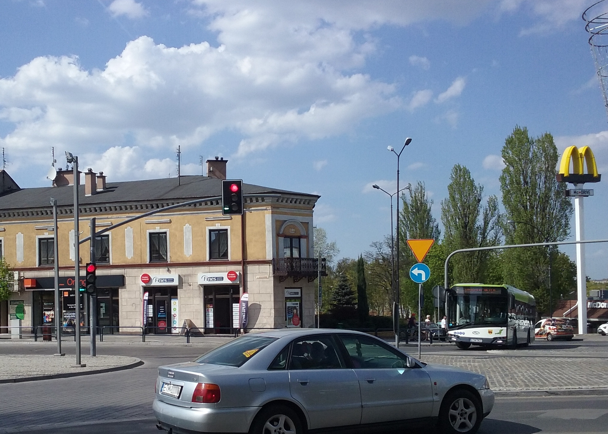 Pierwsza siedziba polskich władz samorządowych w Tomaszowie Mazowieckim. Urzsędowano w niej do wybudowania dzisiejszego Urzędu Miasta podczas kadencji 1921-1927